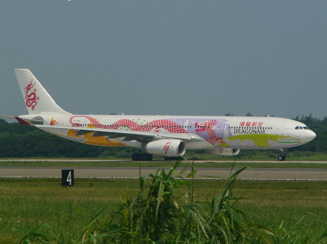 Dragonair (港龍航空) Airbus A330-300 Reg no. B-HWG